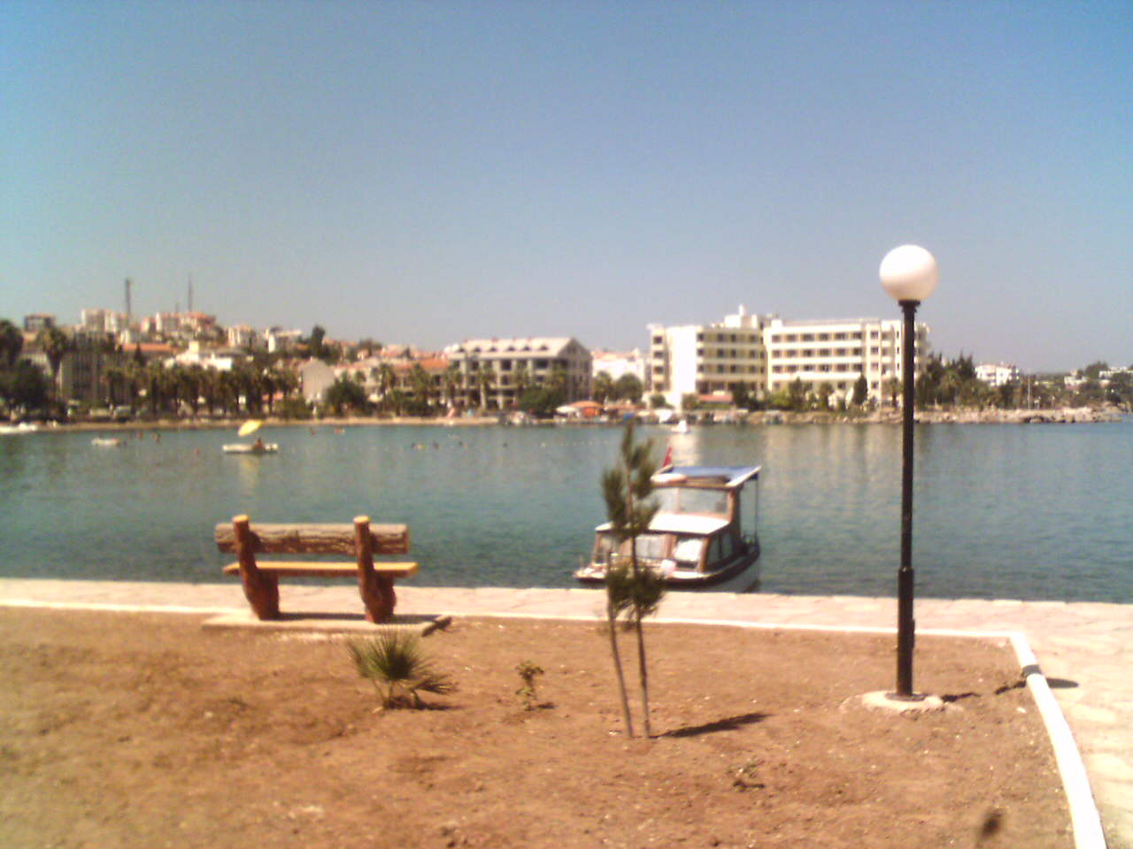 Dosya yükleyen kullanıcıya aittir. Resim Datça, Muğla'da çekilmiş olup karşı kıyıda sağdaki bina Datça Öğretmenevidir.